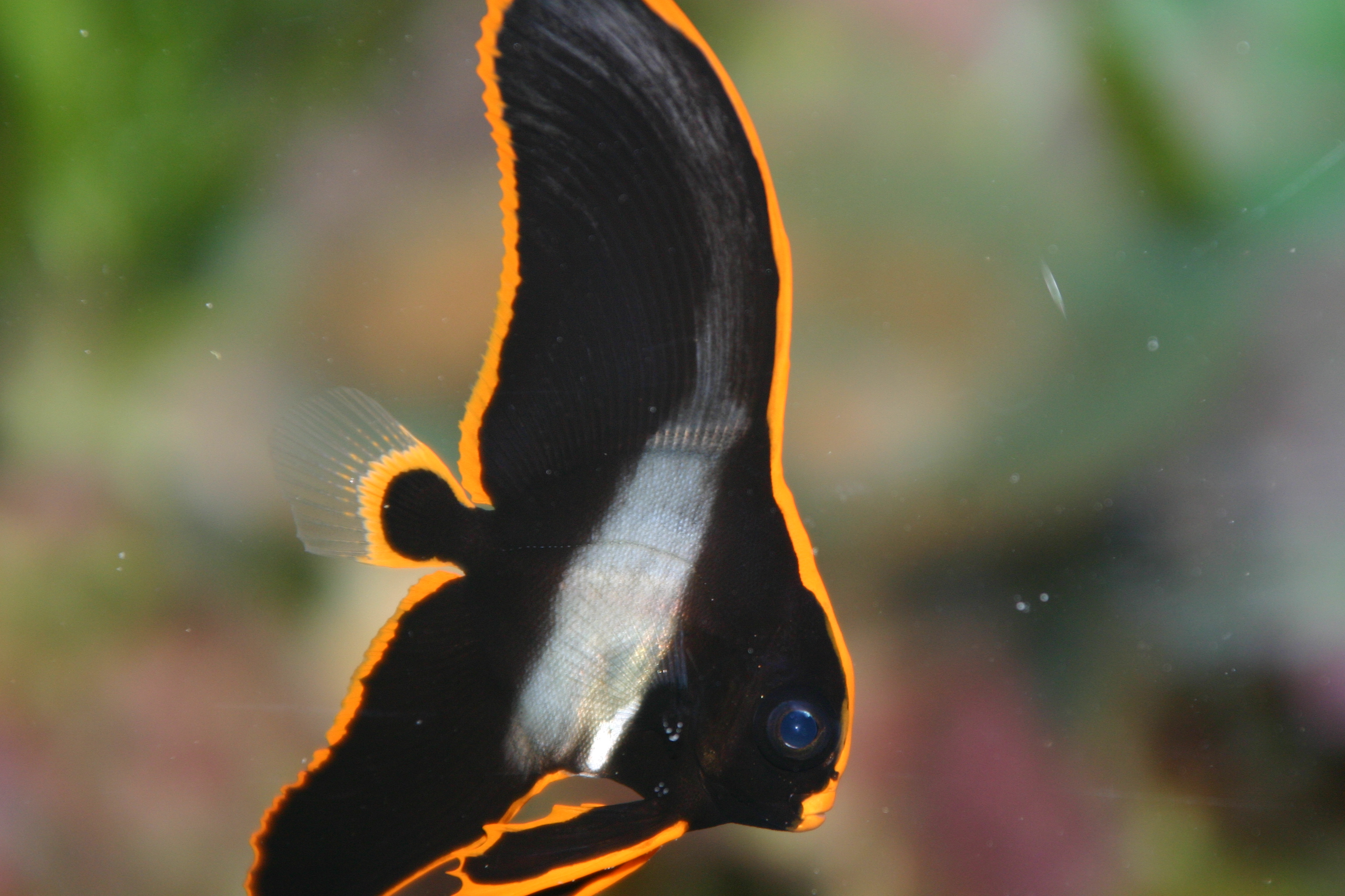 Platax pinnatus juvenil en acuario